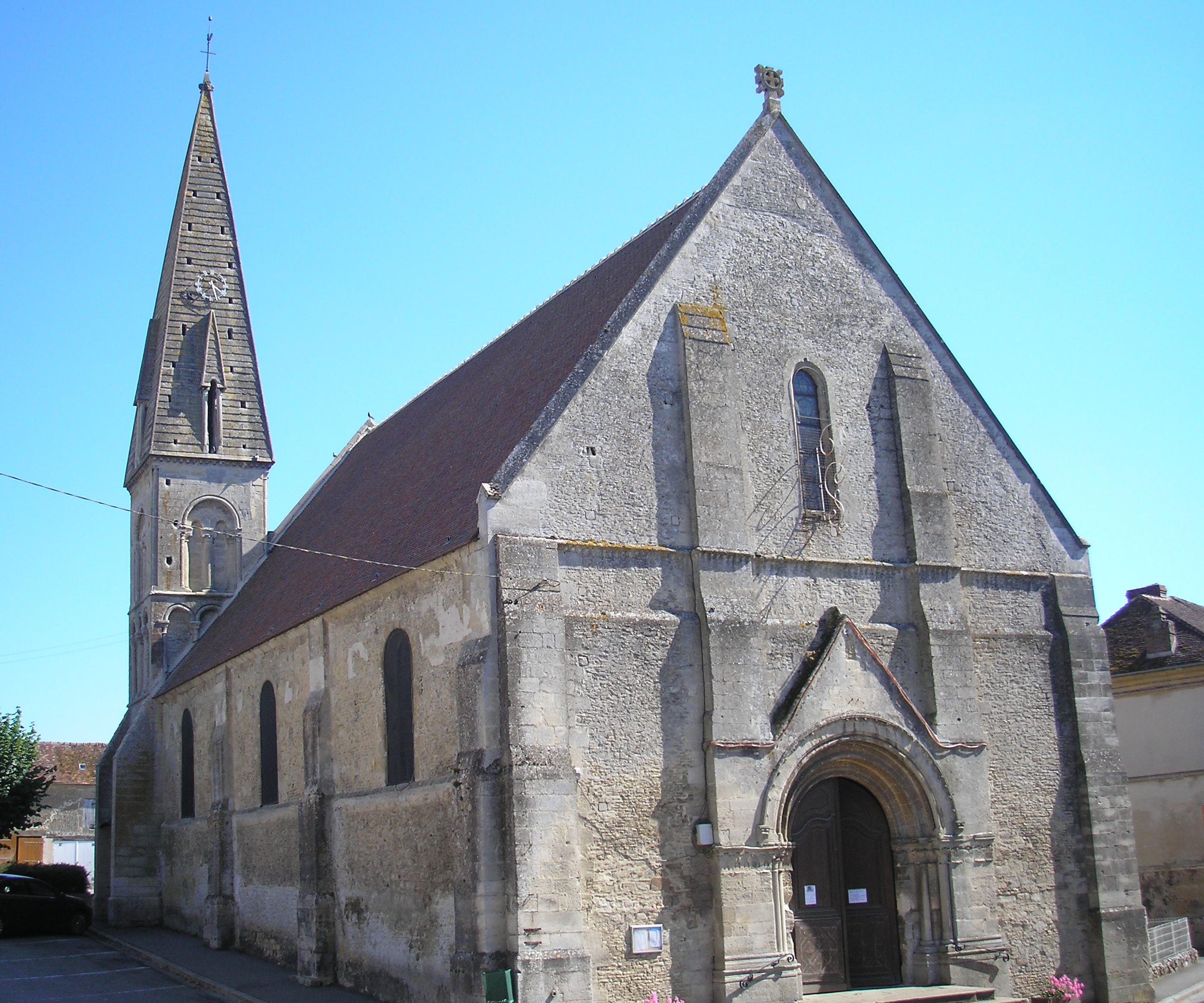 Chambois (Normandie, France). L'église Saint-Martin.